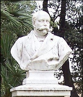 Alfredo Cottrau, ingegnere progettista e dirigente d'impresa di origine napoletana, si costruisce in gioventù una seria formazione tecnica ed empirica. Dopo il 1861 dirige a Torino i lavori per il traforo del Moncenisio; dal 1873 la sua attività è¨ legata all'Impresa industriale italiana di costruzioni metalliche e alla costruzione di ponti in ferro e linee ferroviarie.